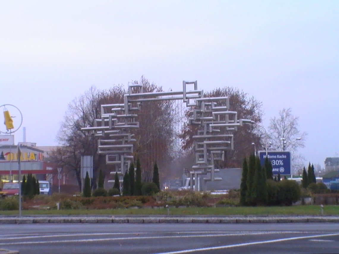 Композиция „Лира Орфея“ в Кырджали (Болгария)